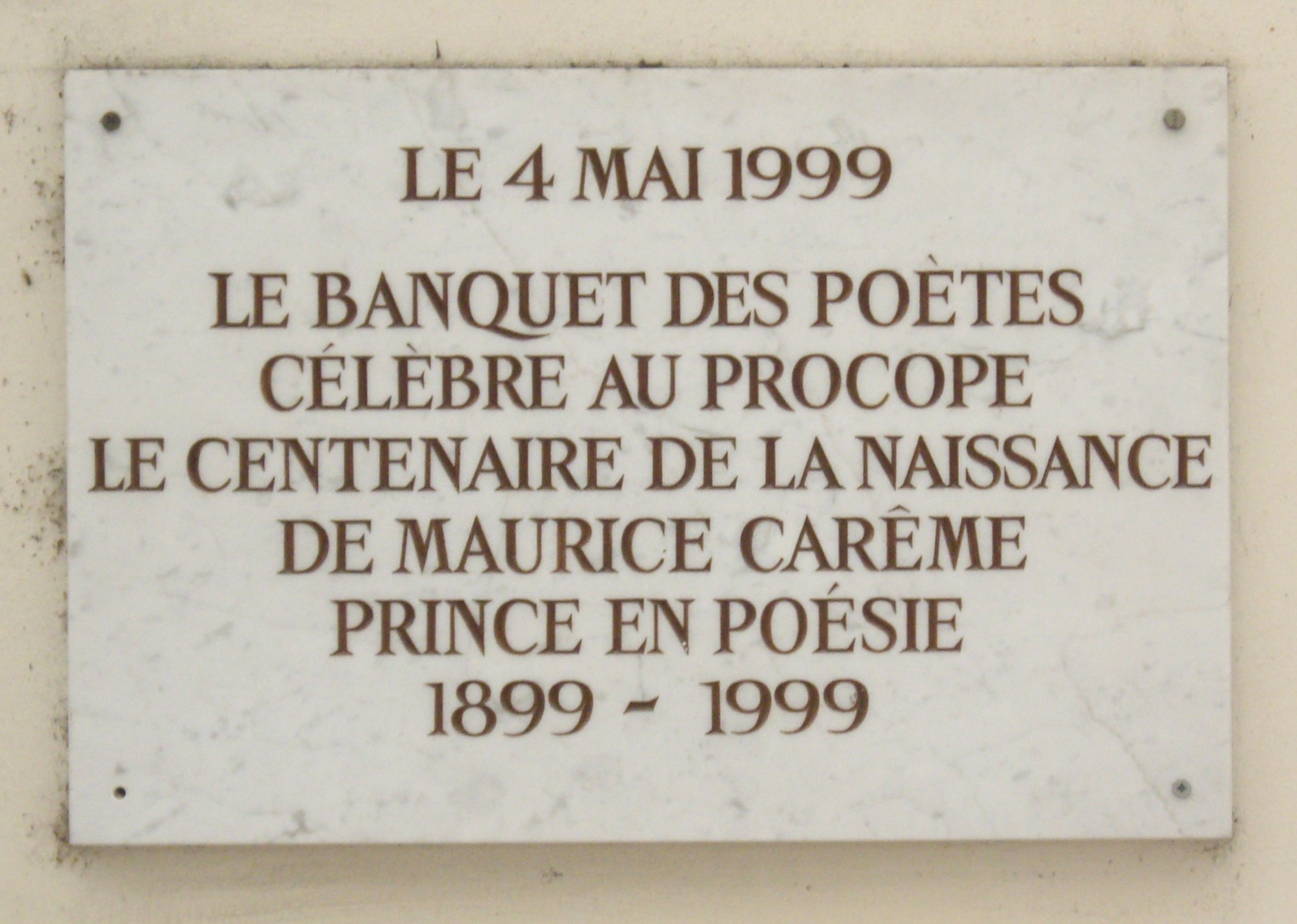 Plaque à l'extérieur du café Procope dans la cour du Commerce-Saint-André. « Le 4 mai 1999 le Banquet des Poètes célèbre au Procope le centenaire de la naissance de Maurice Carême, Prince en Poésie, 1899-1999. »